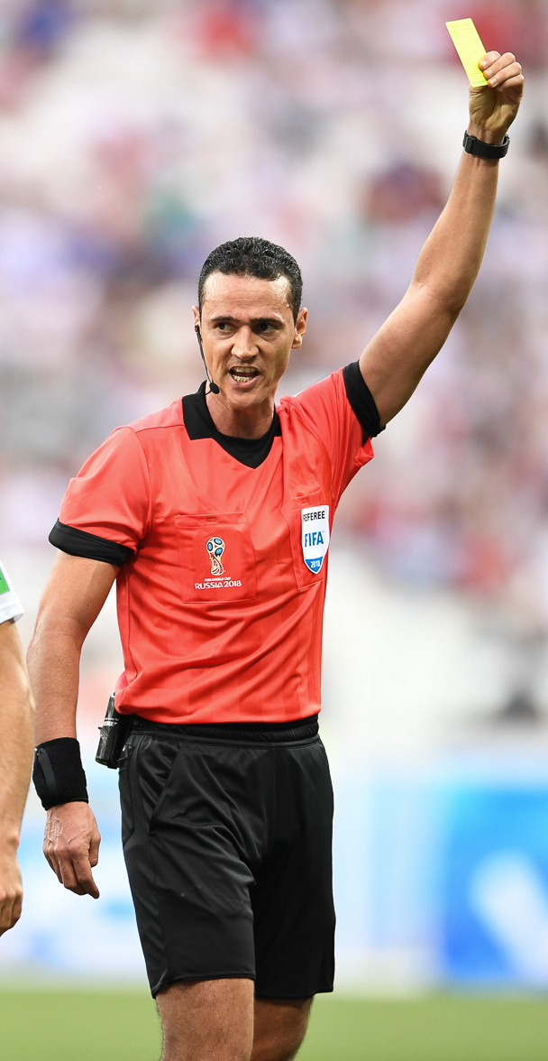 Египет с Салахом проиграл Саудовской Аравии